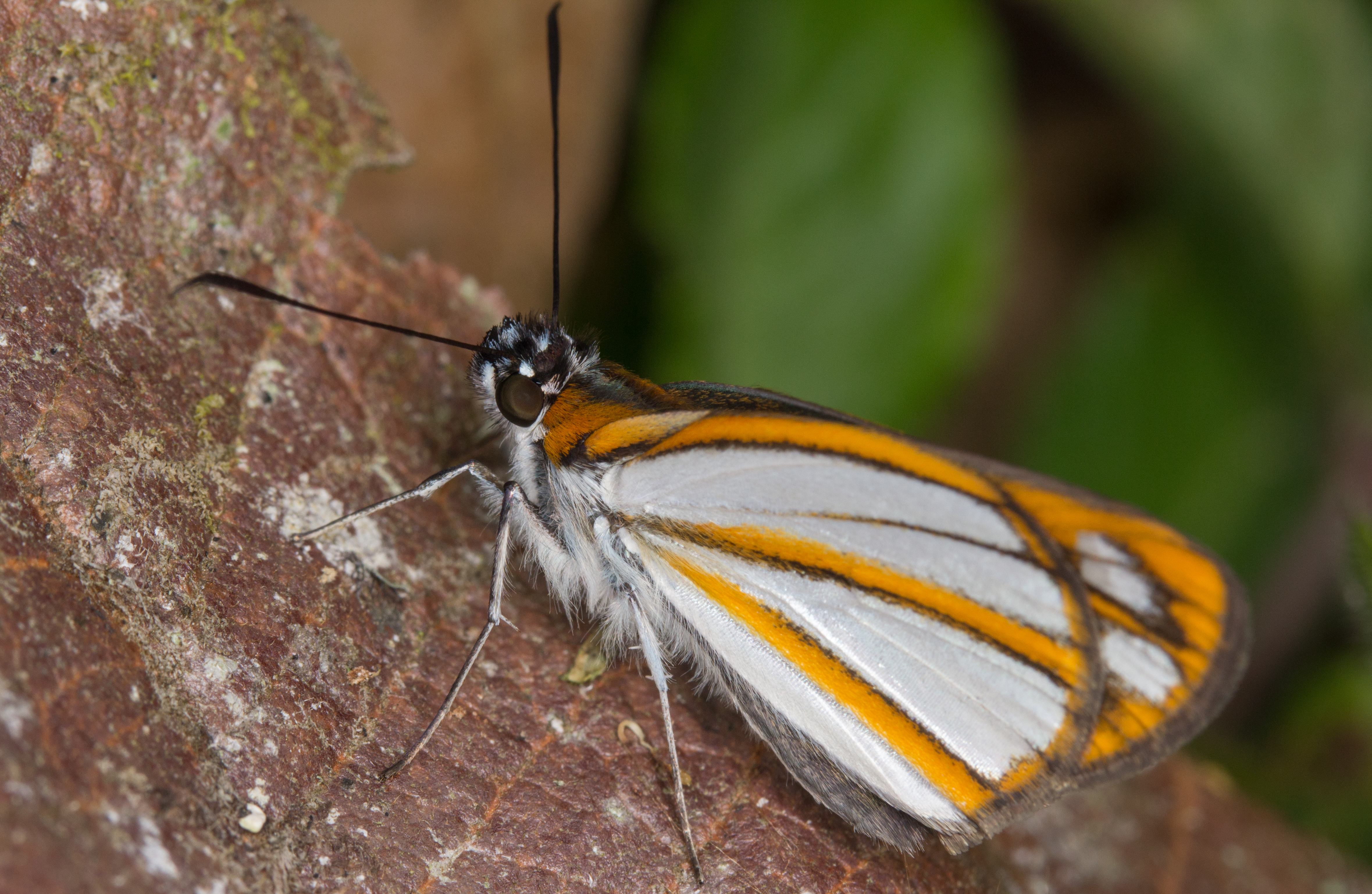 Silver-plated Skipper